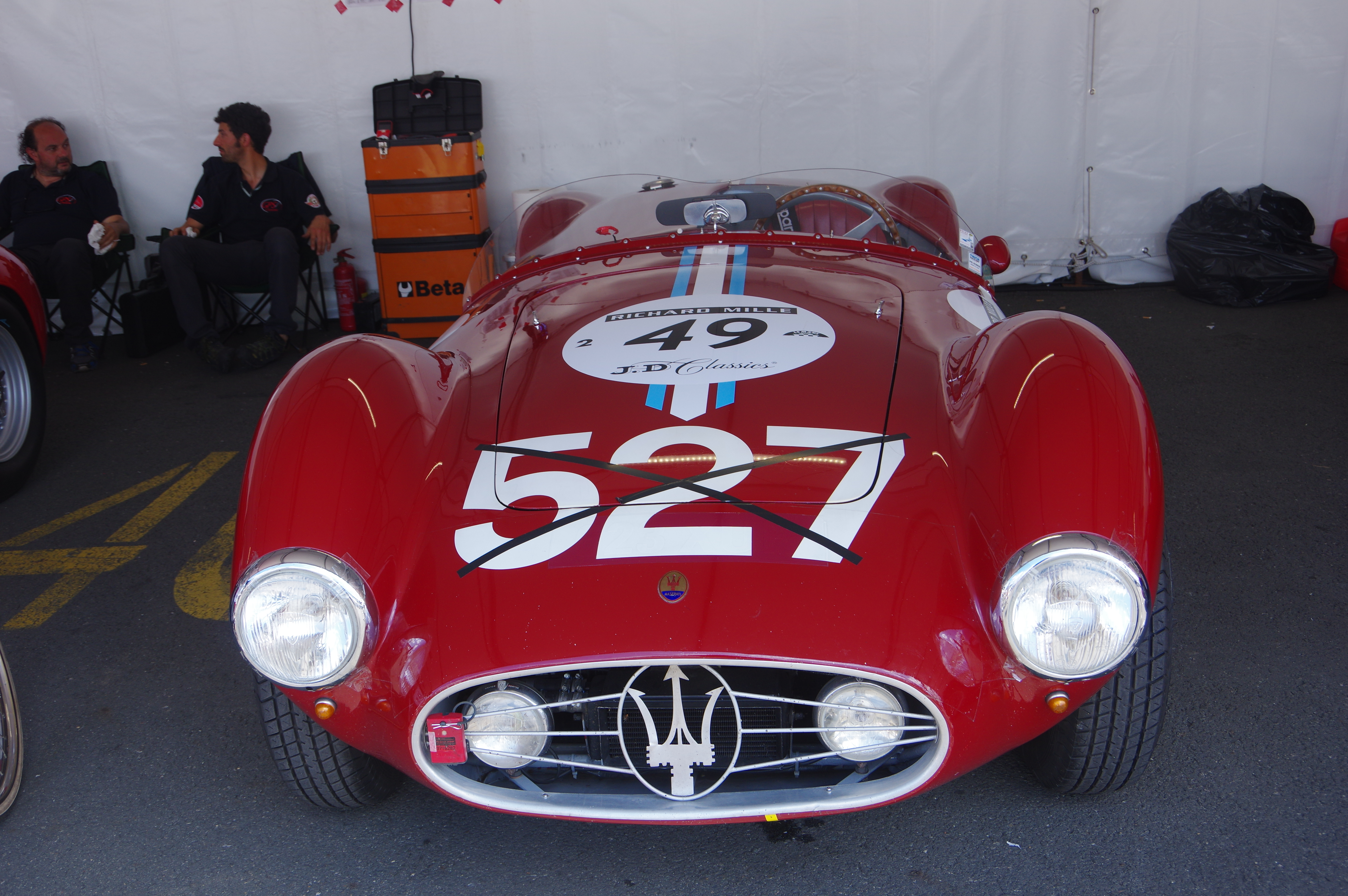 Le Mans Classic 2016